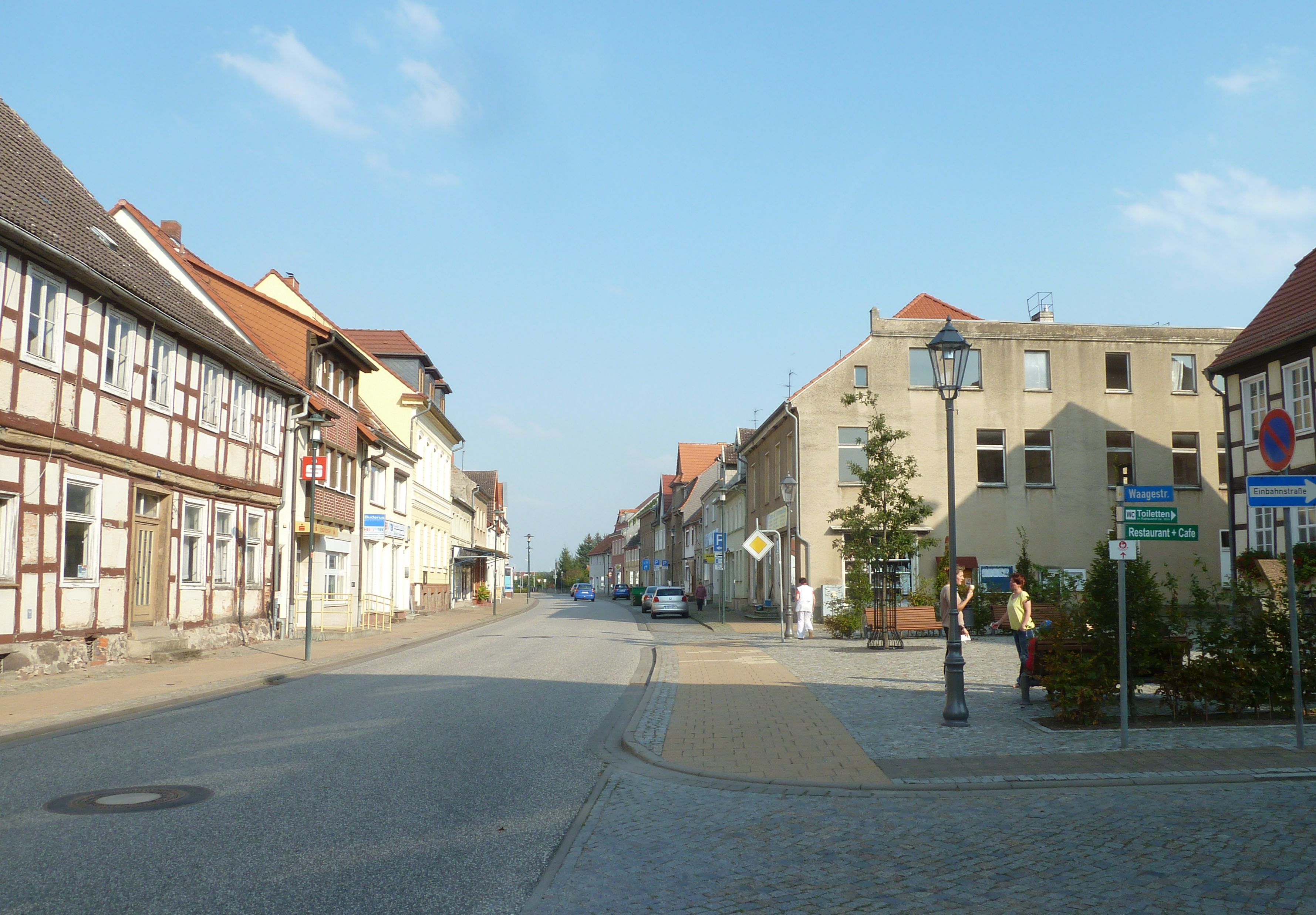 Putlitz, der Bereich Ernst-Thälmann-Straße/Rathausplatz ist als ganzes denkmalgeschützt